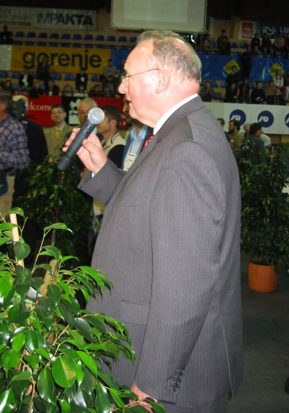 Olimpiada Bled 2002: Glavni sodnik je bil izkušeni Nizozemec Geurt Gijssen